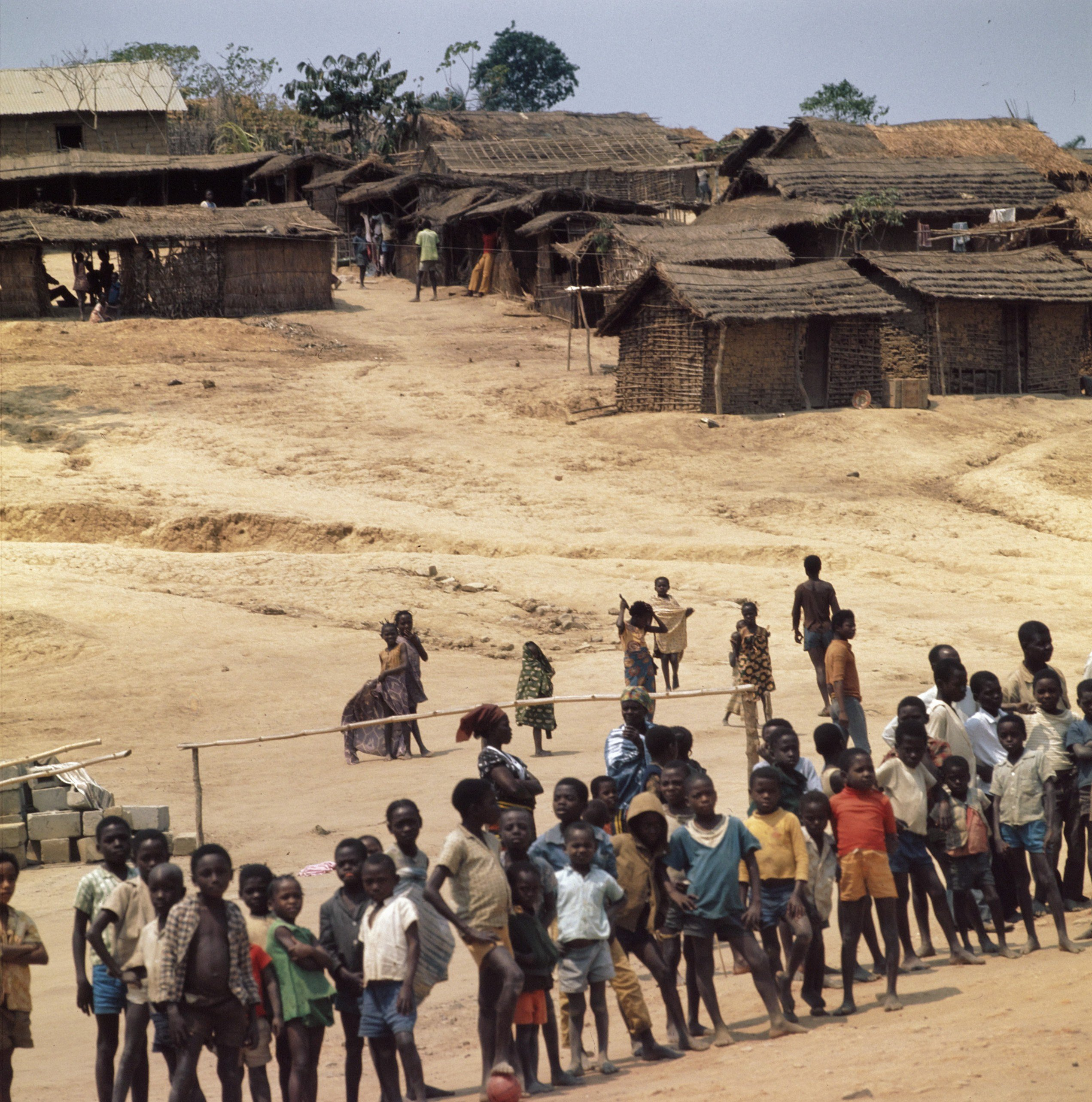 Collectie / Archief : Fotocollectie Anefo Reportage / Serie : [ onbekend ] Beschrijving : Zaire (voorheen Belgisch Congo ); kamp voor Angolese vluchtelingen in Zaire Datum : 16 augustus 1973 Locatie : Angola, Belgisch Congo, Zaïre Trefwoorden : VLUCHTELINGEN Fotograaf : Mieremet, Rob / Anefo Auteursrechthebbende : Nationaal Archief Materiaalsoort : Dia (kleur) Nummer archiefinventaris : bekijk toegang 2.24.01.07 Bestanddeelnummer : 254-9418